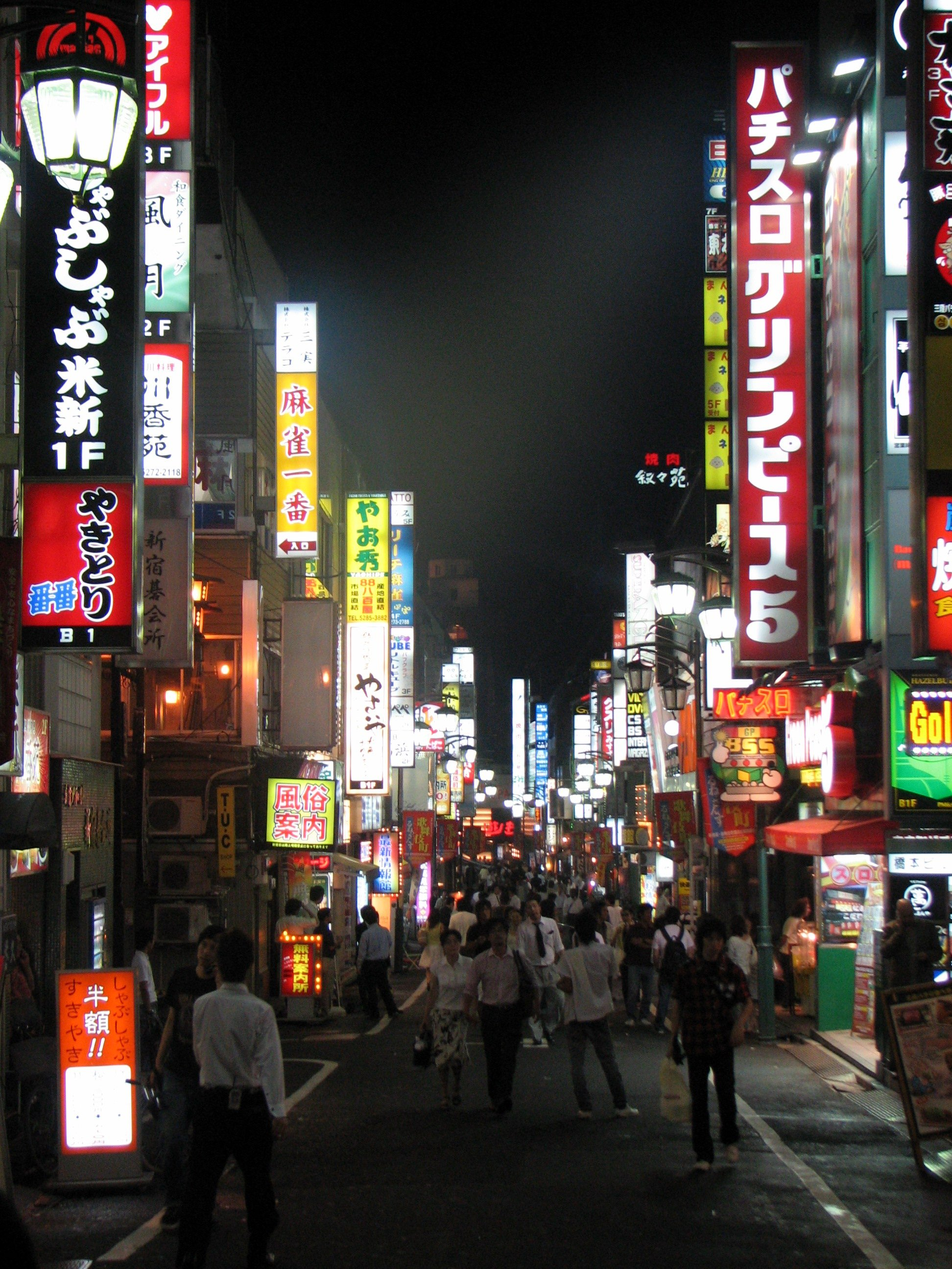 Kabukicho at night